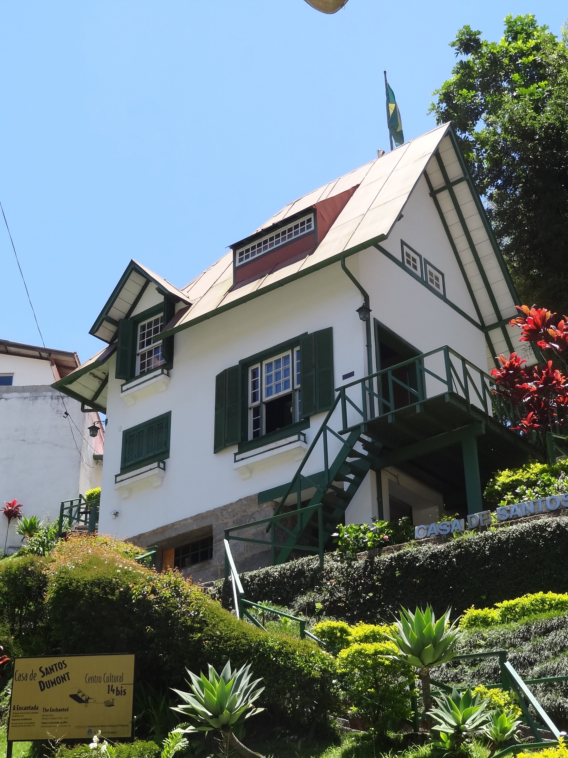 Casa de Santos Dumont - Rua Riachuelo, nº 22, com o respectivo acervo de objetos e utilidades pertencentes a Santos Dumont